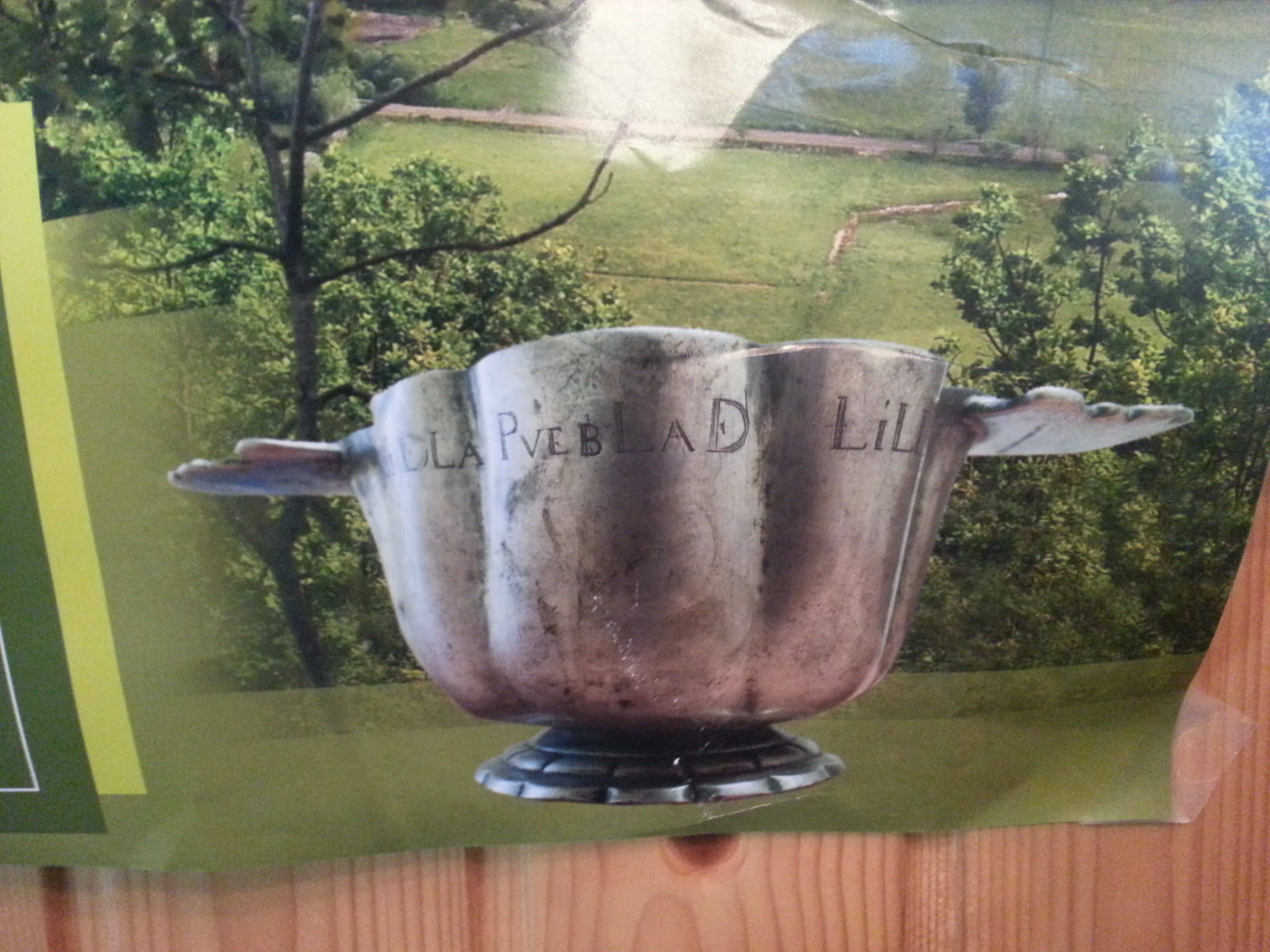 Reconstruccion de la copa concejil como la usada en Puebla de Lillo